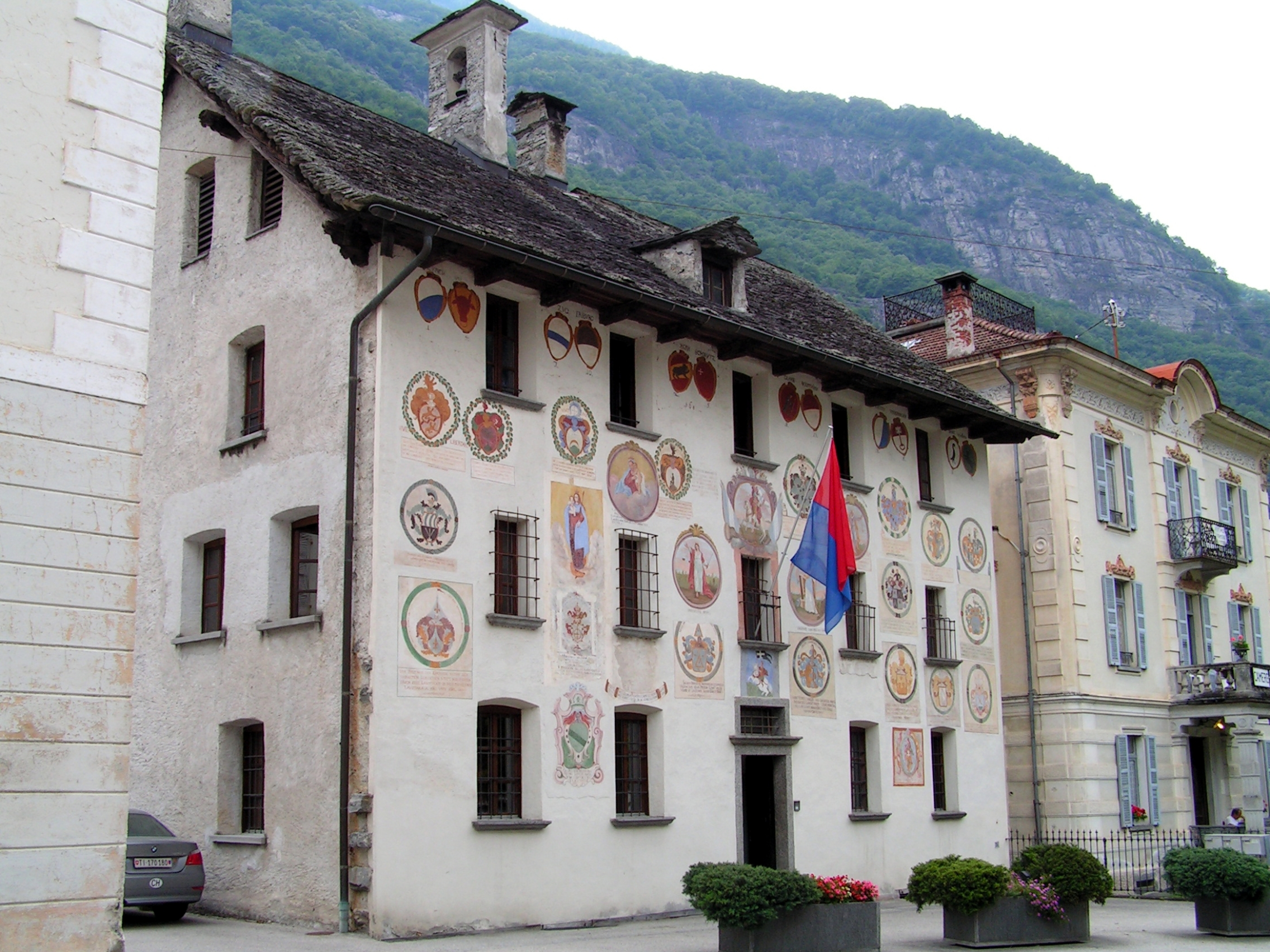 Piazza 5, Cevio. Pretorio. Town hall of Cevio.